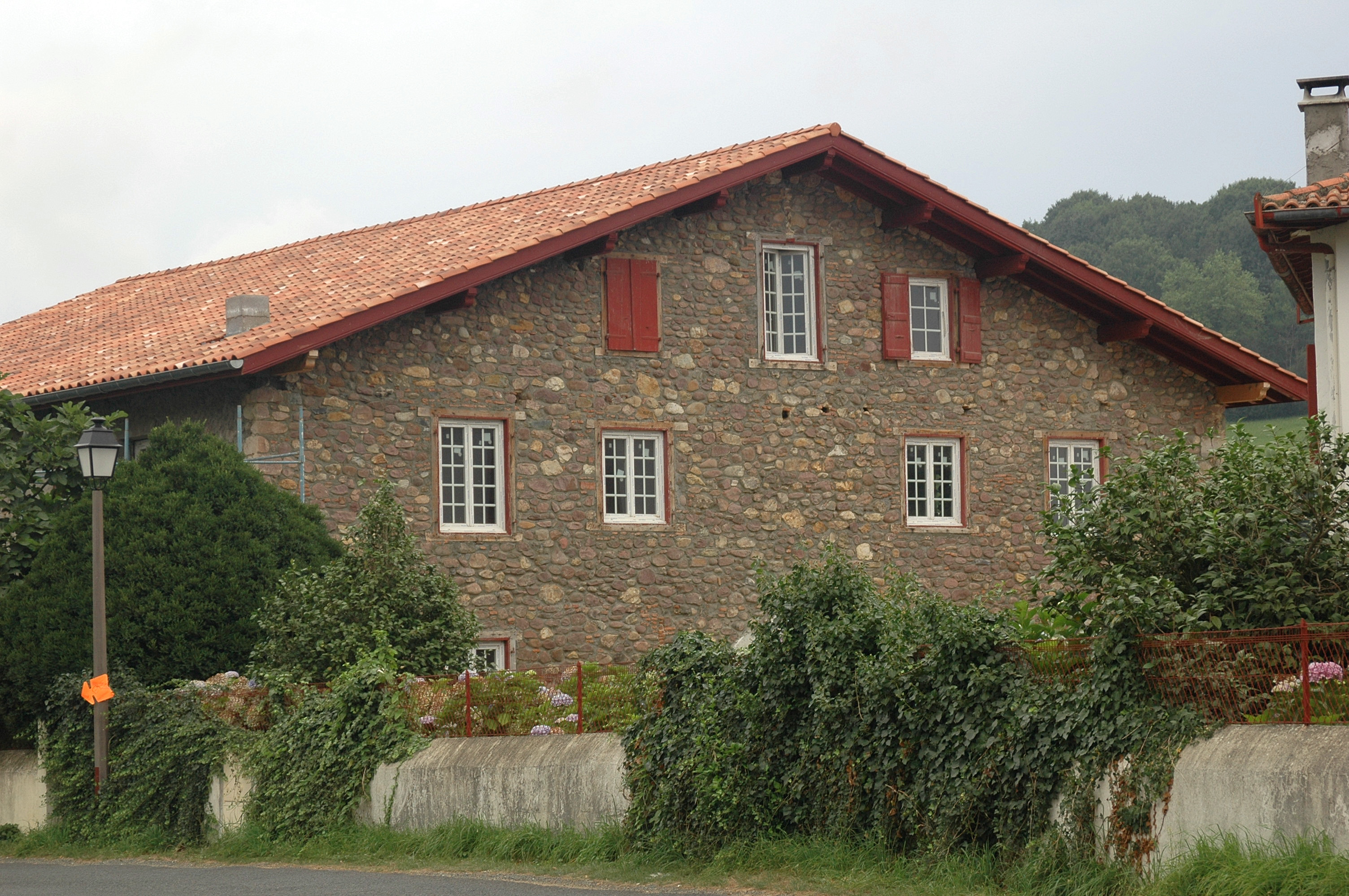 Itxassou, ferme dans le village. Photo prise le 27/07/06 par Harrieta171